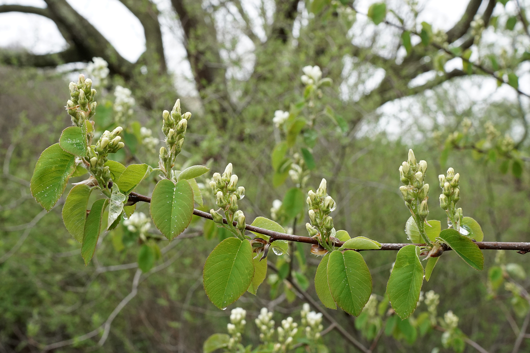 Amelanchier ovalis (Garden Shadblow)